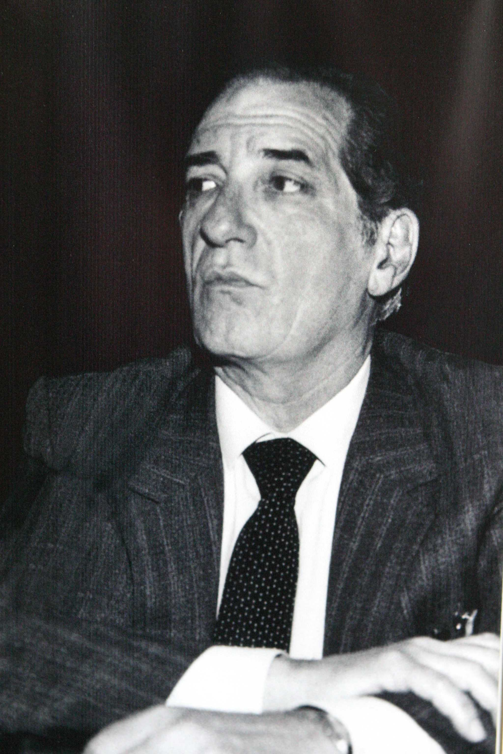 Pablo Baraona